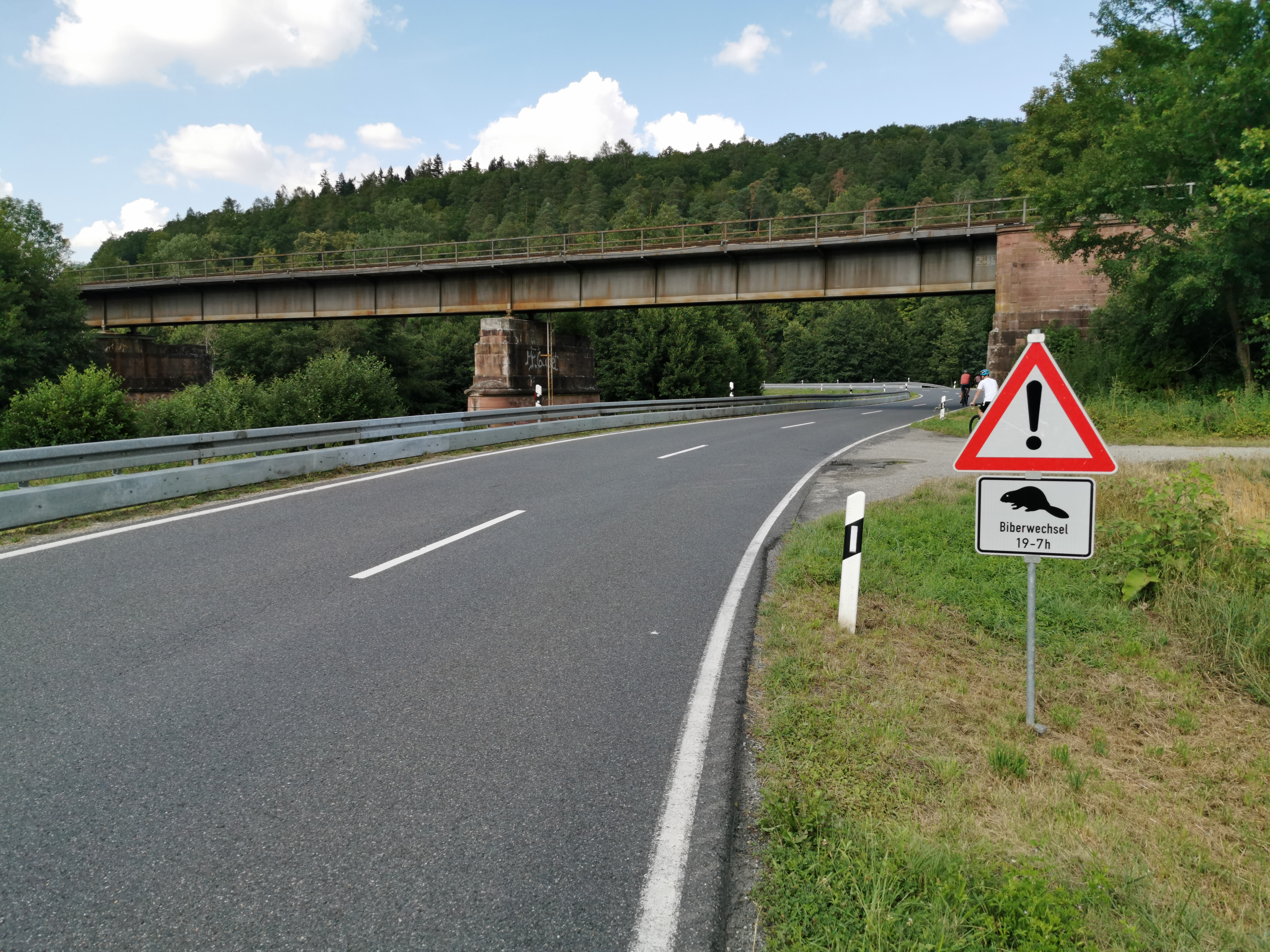 Autofreier Sonntag im Lieblichen Taubertal